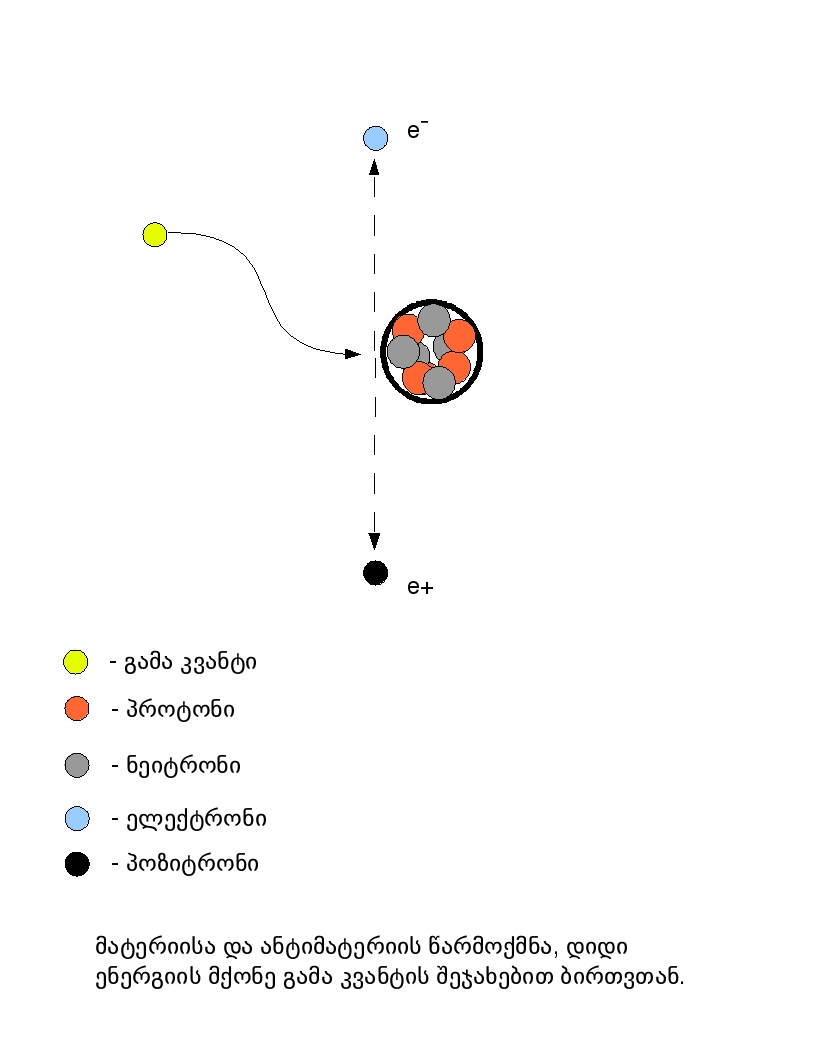 მატერიისა და ანტიმატერიის წარმოქმნა